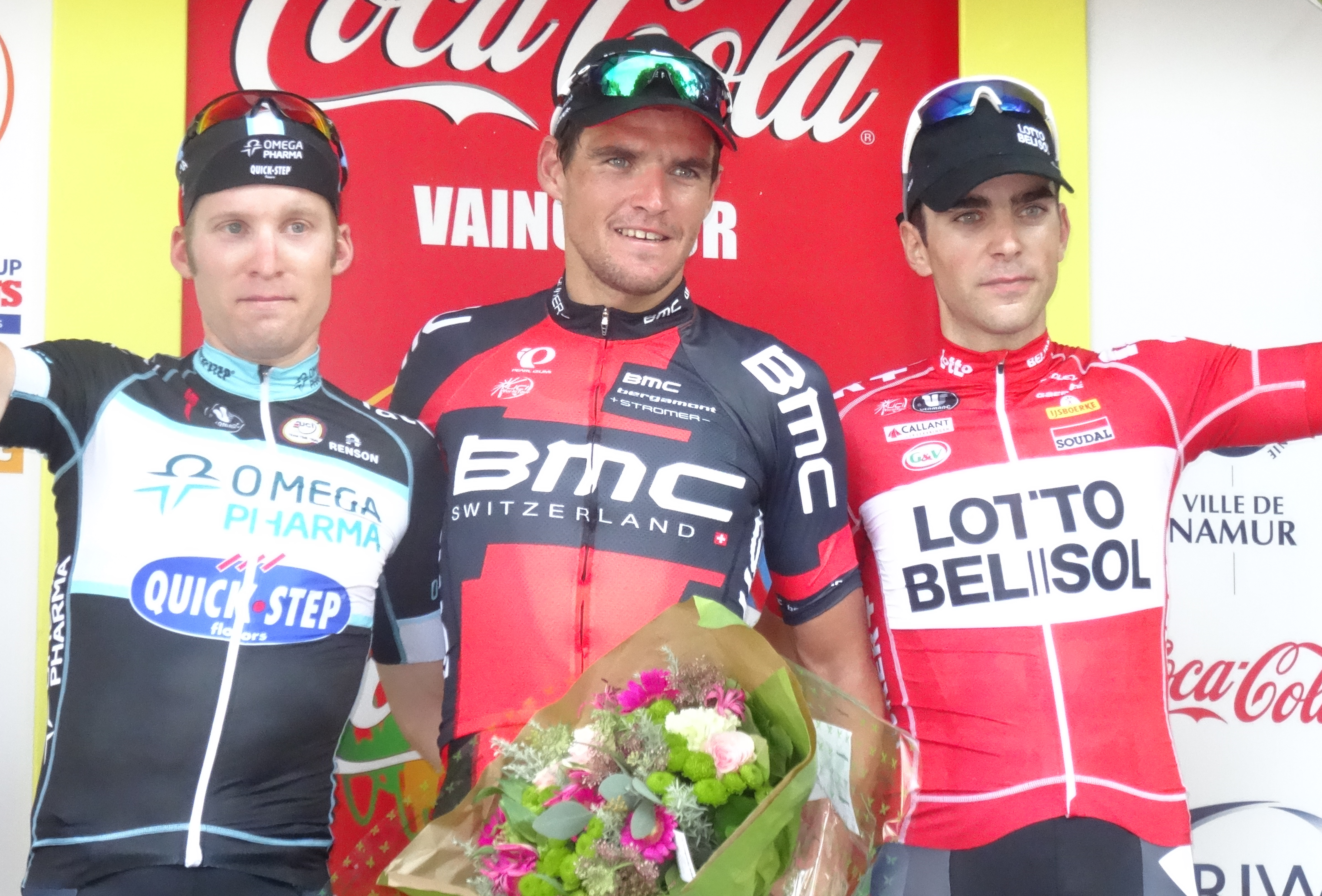 Reportage photographique réalisé le mercredi 17 septembre à l'occasion de l'arrivée du Grand Prix de Wallonie 2014 à la citadelle de Namur, Belgique.